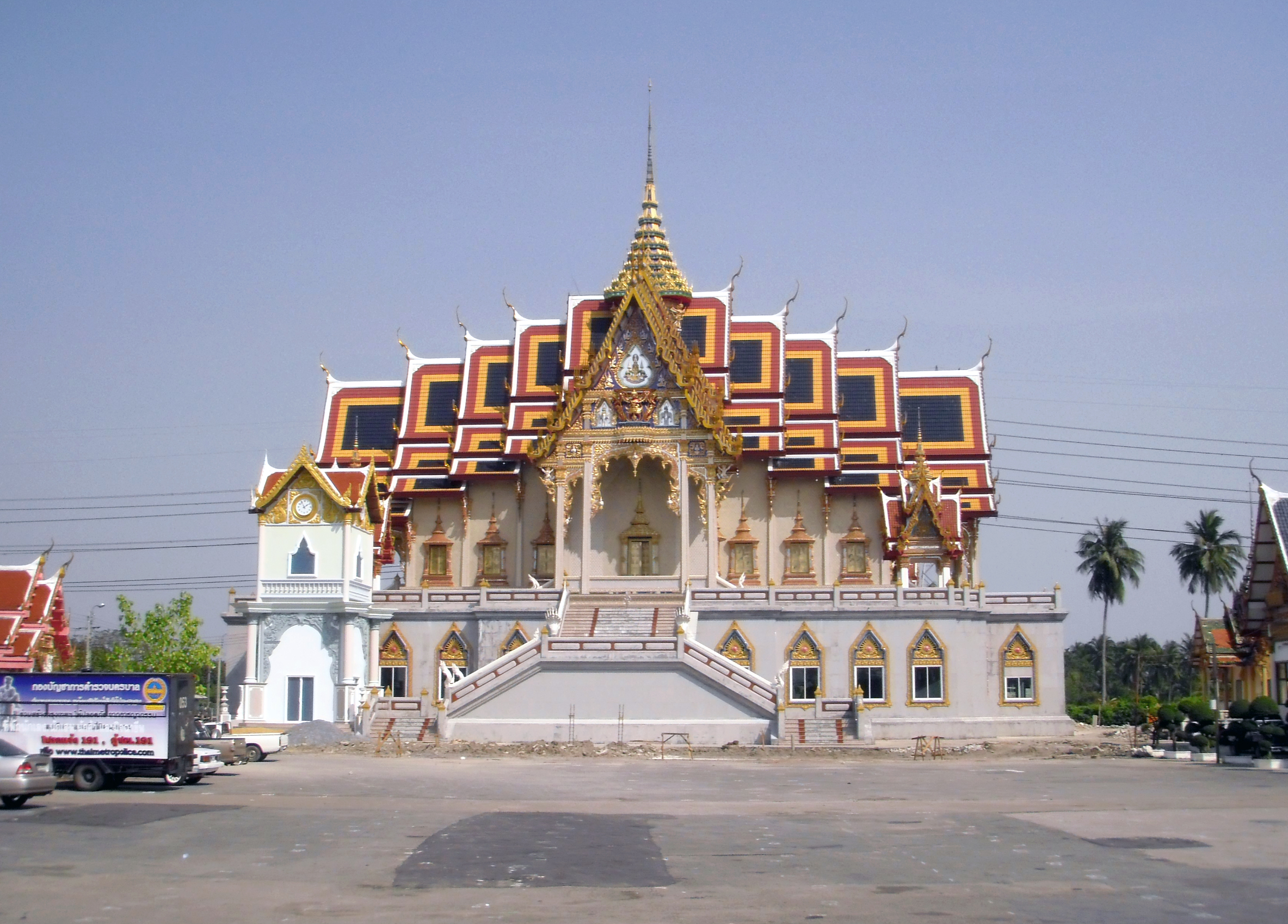 วัดม่วง